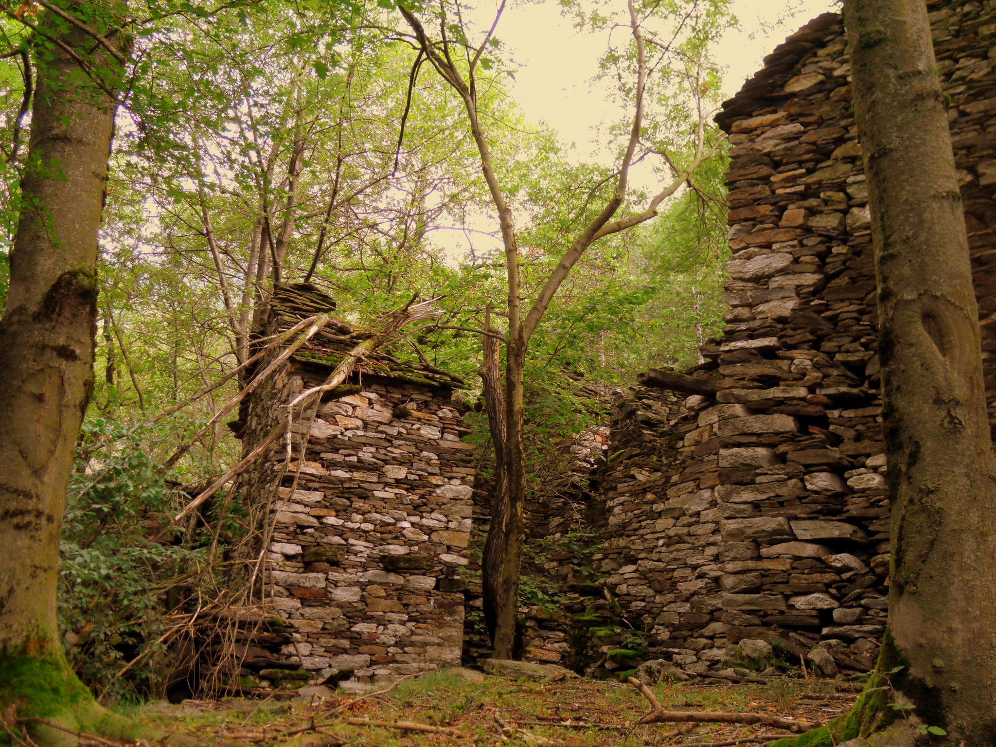 Il bosco rivendica le costruzioni dell'abitato abbandonato di Montuzzo